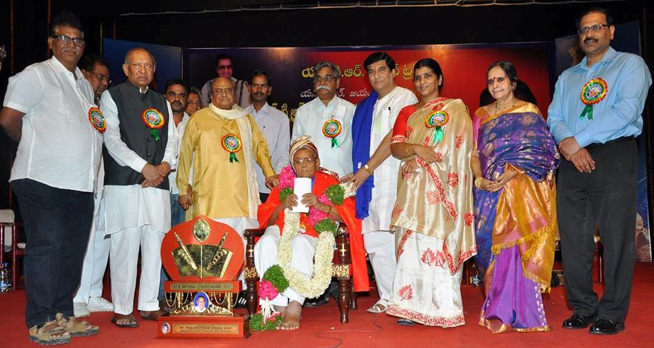 ఎన్టీర్ జాతీయ పురస్కారం (ఎన్టీఆర్ విజ్ఞాన్ ట్రస్ట్)